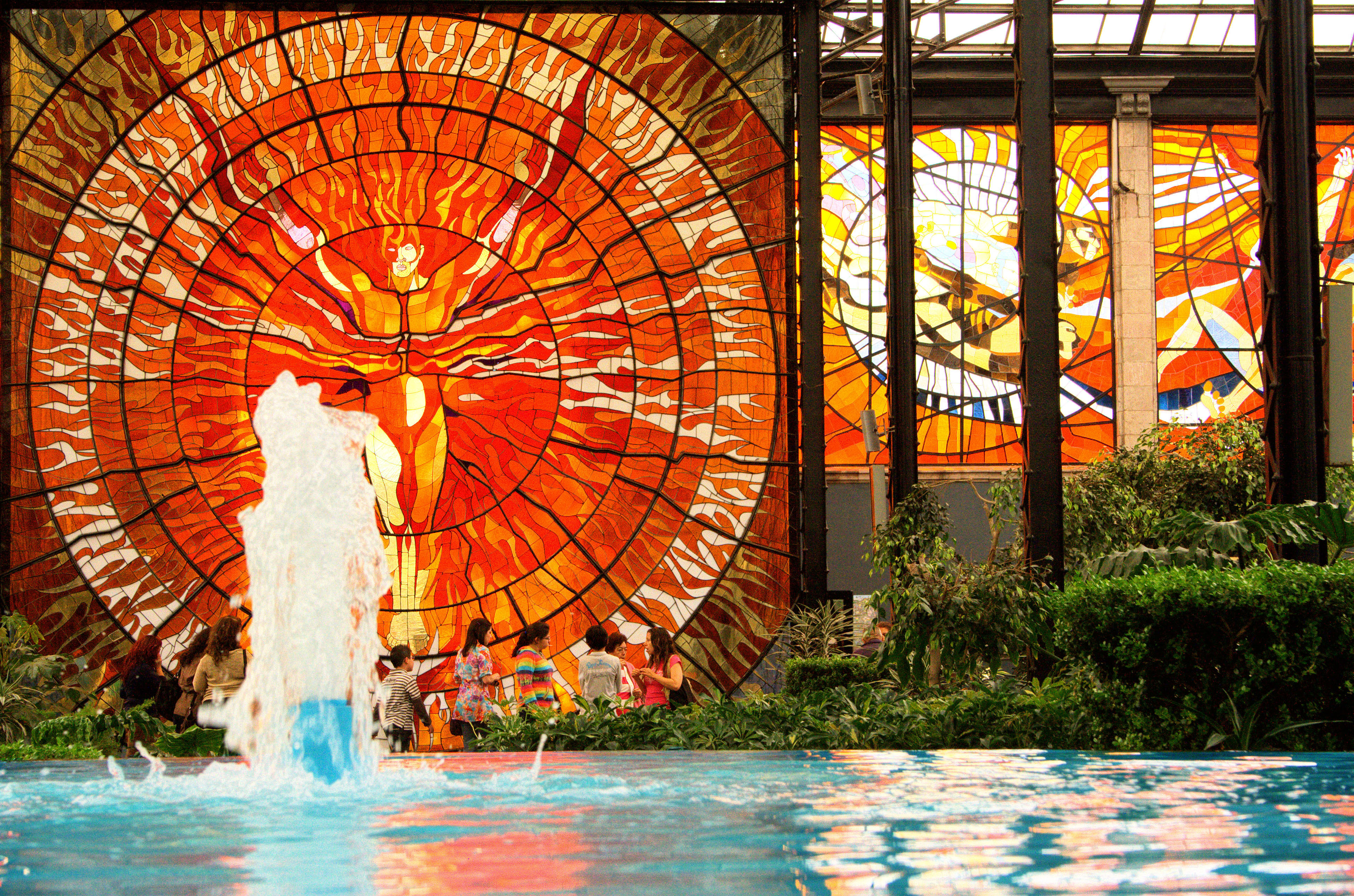 CosmoVitral en Toluca México.